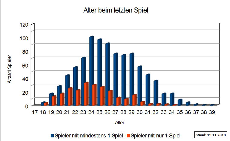 Altersverteilung der deutschen Fußballnationalspieler beim Abschied, Stand 11.8.2010